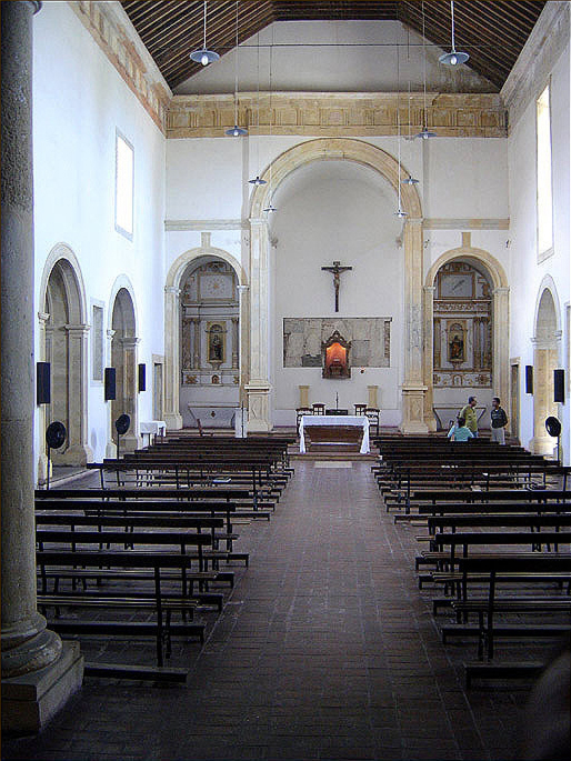 Interior da Igreja de Nossa Senhora da Graça, em Olinda, Brasil.